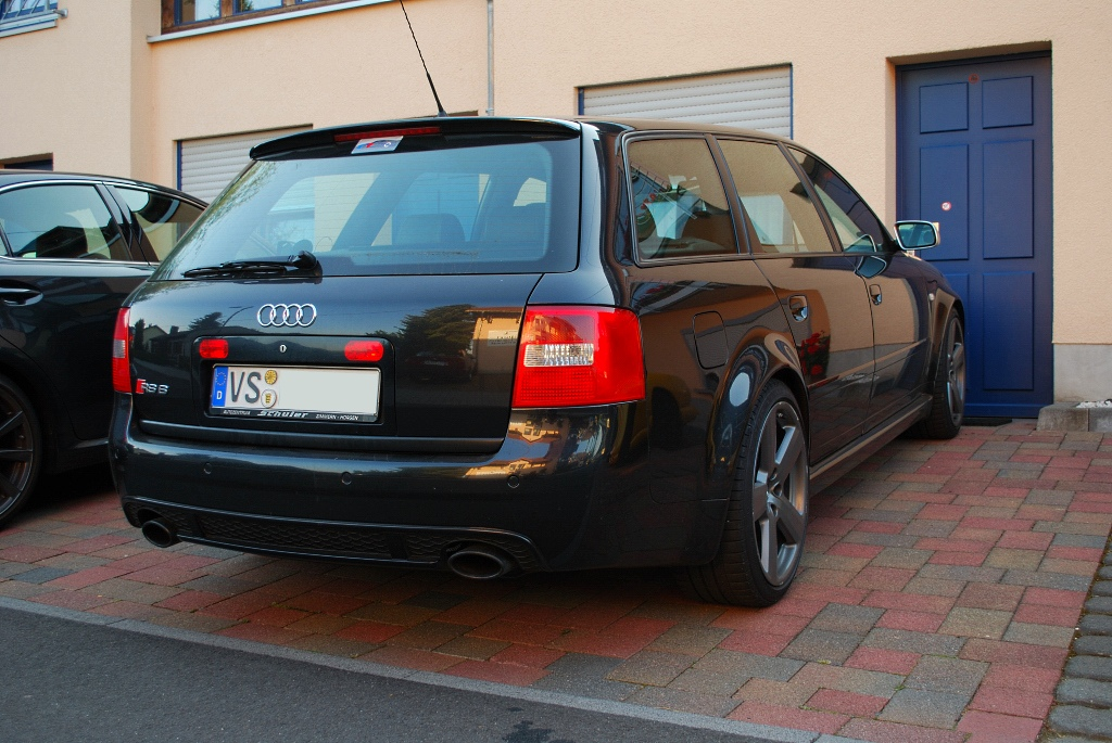 Die Heckansicht des limitierten RS6 Avant Plus.